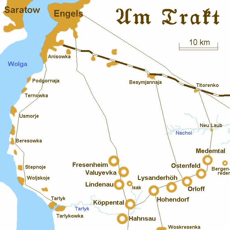 Volgagerman settlement Am Trakt